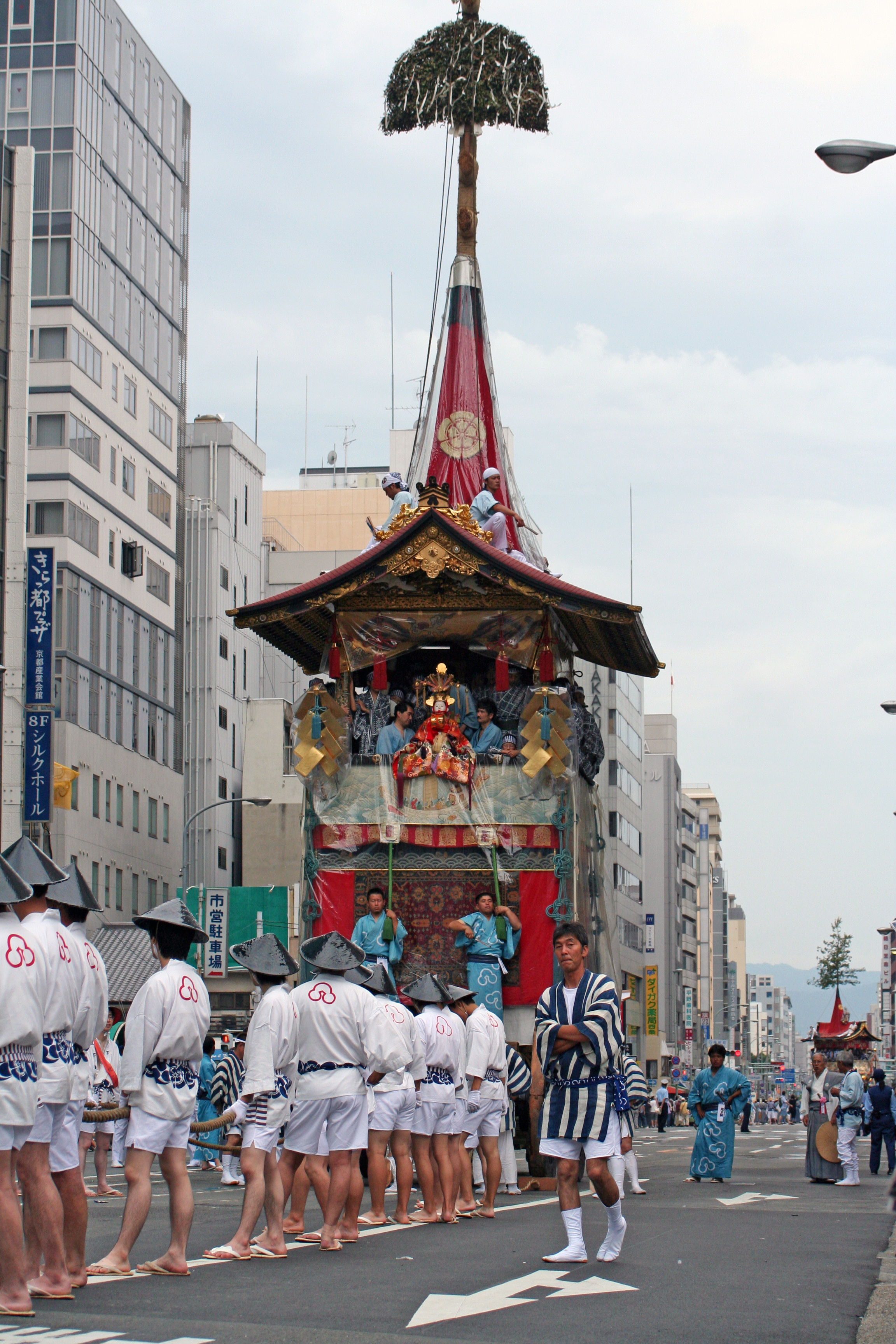 2009年7月17日に京都市で行なわれた祇園祭山鉾巡行の様子。 ほぼ前から見た放下鉾。